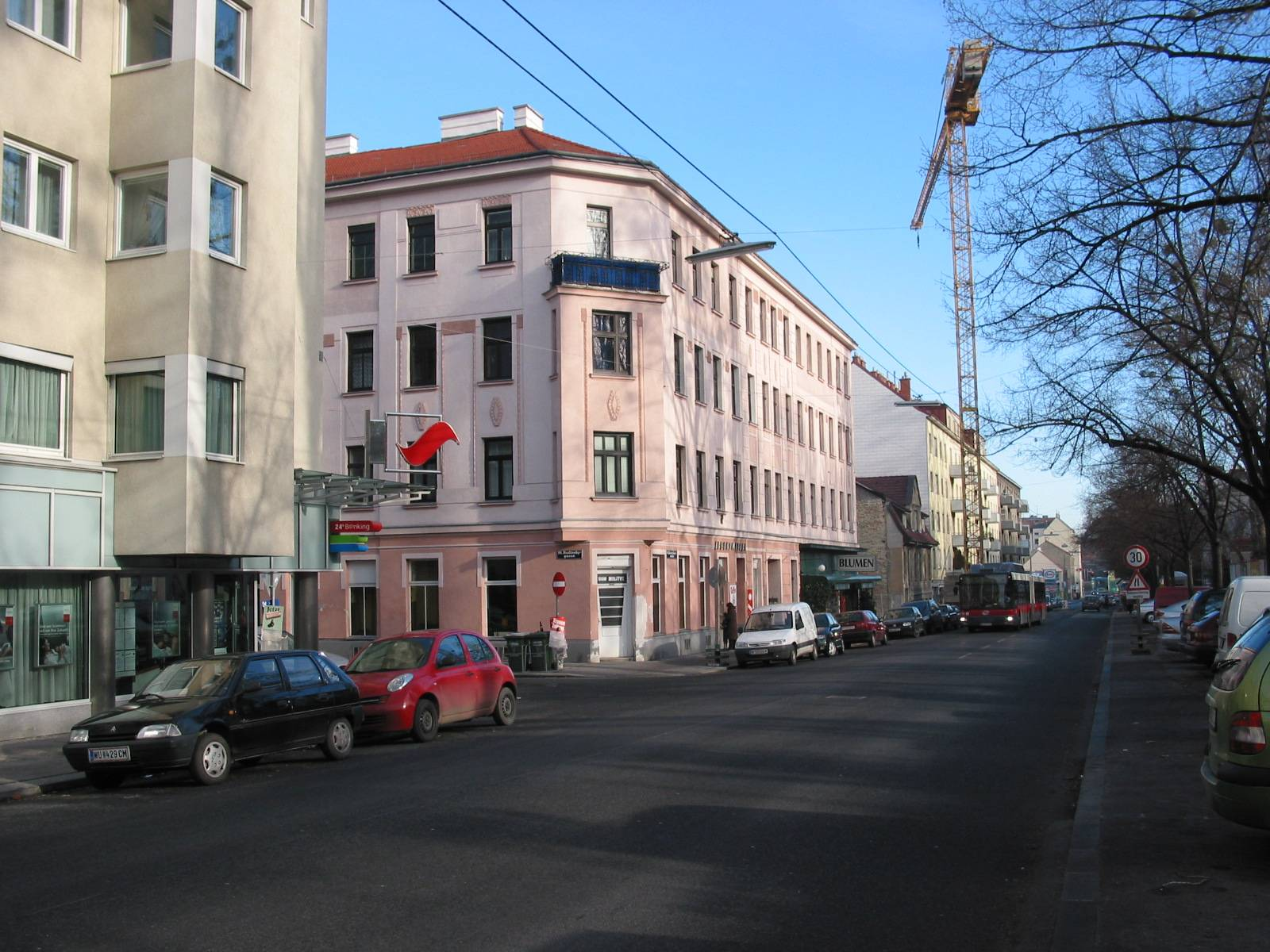 Krottenbachstraße, Vienna XIX, 2005-12-04 selfmade photo